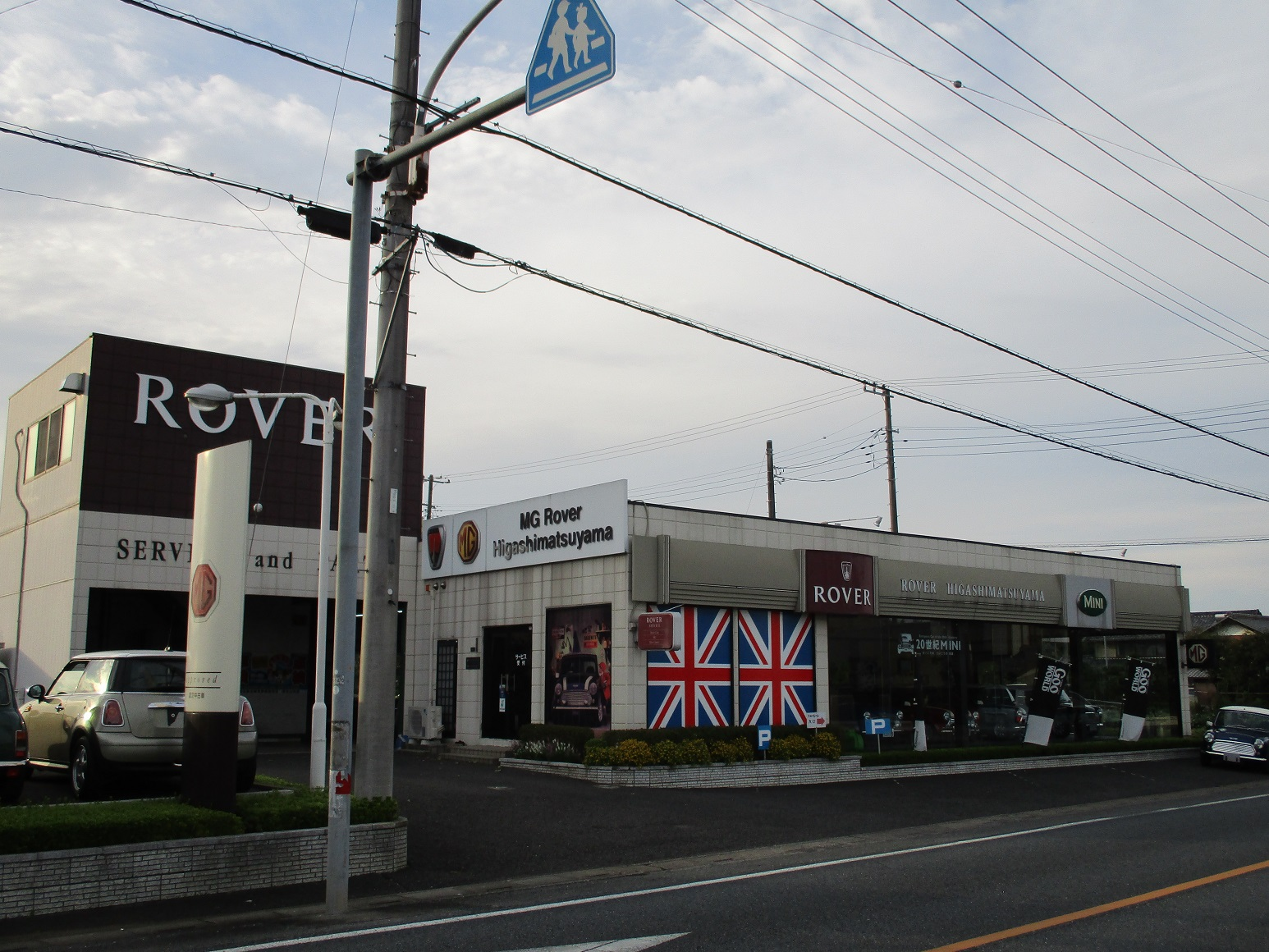 2016年本人撮影